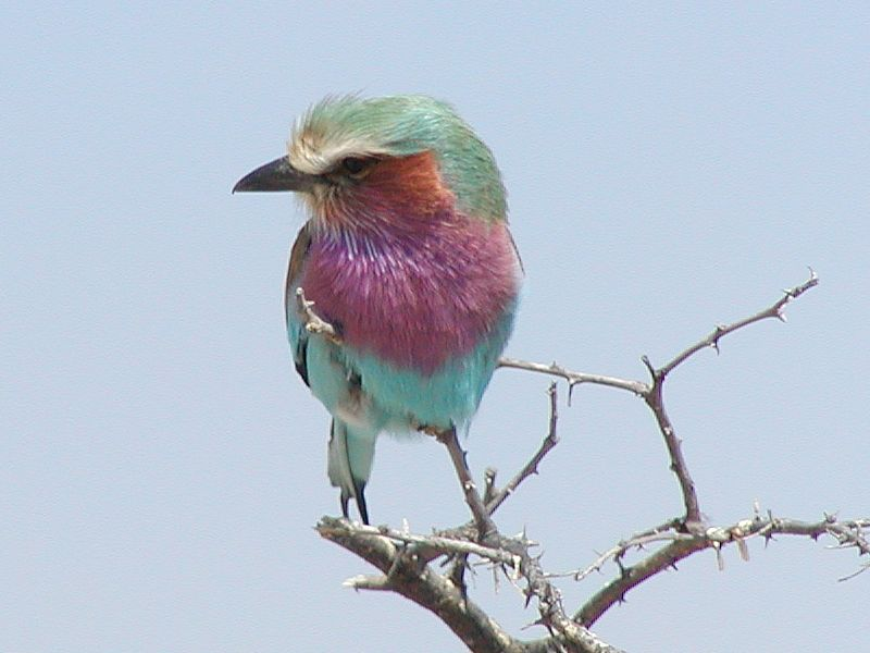 Gabelracke01